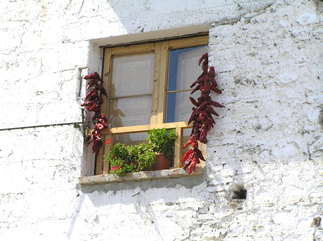 Peperoni secchi appesi all'esterno di un davanzale di Tursi per favorire l'essiccazione.